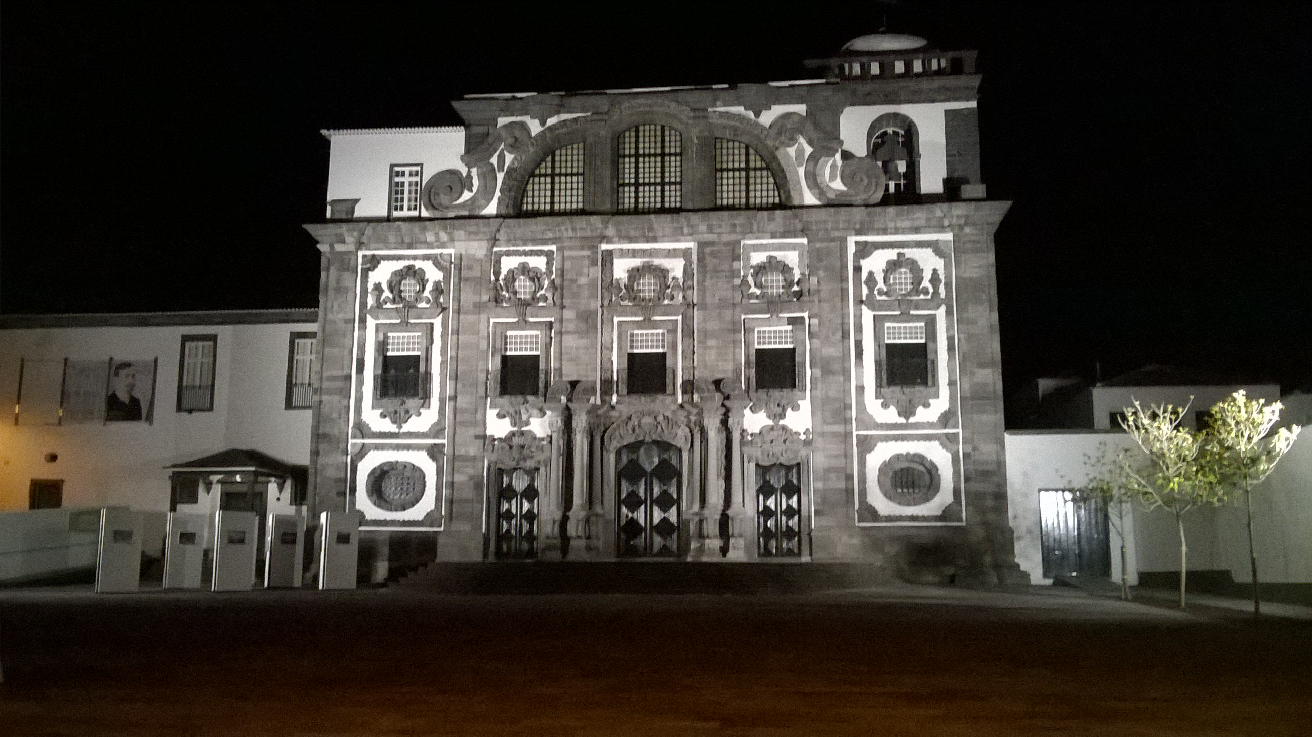 Igreja do Colégio dos Jesuítas, freguesia de São Sebastião, concelho de Ponta Delgada, Ilha de São Miguel, Região Autónoma dos Açores: vista noturna.